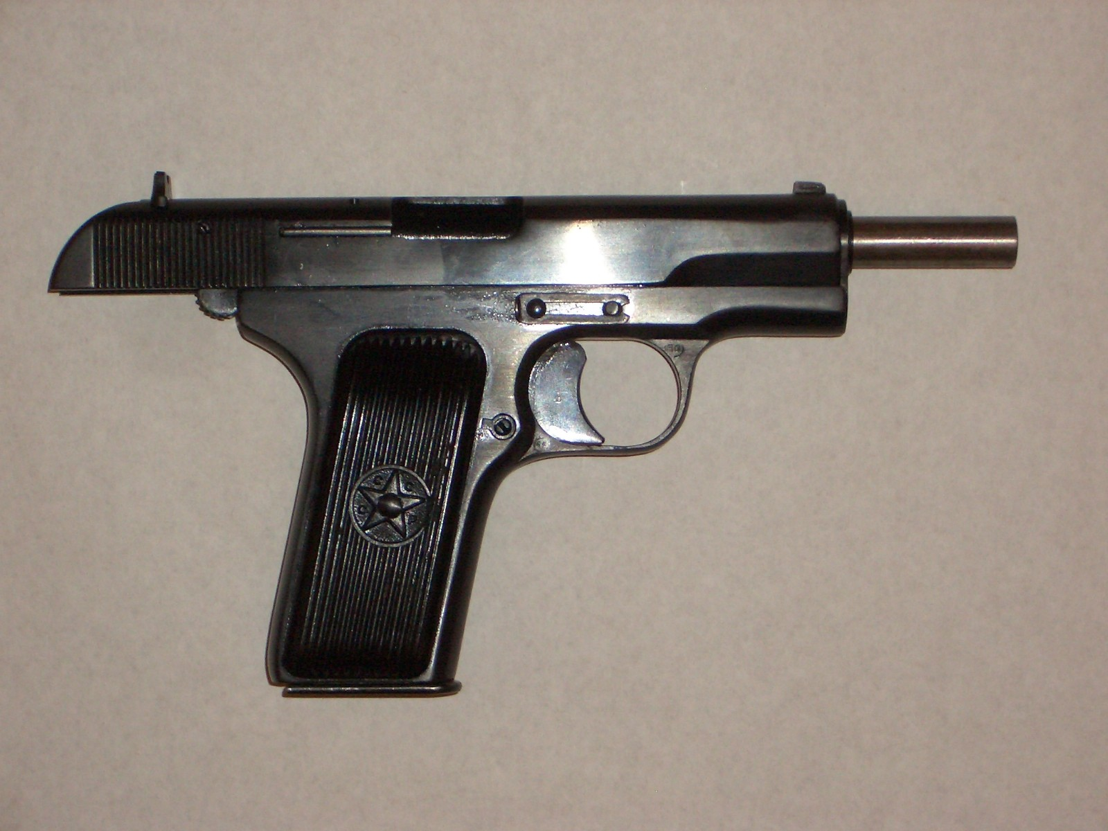 ТТ на затворной задержке Пистолет ТТ (Тула, Токарев) советского послевоенного производства на затворной задержке.